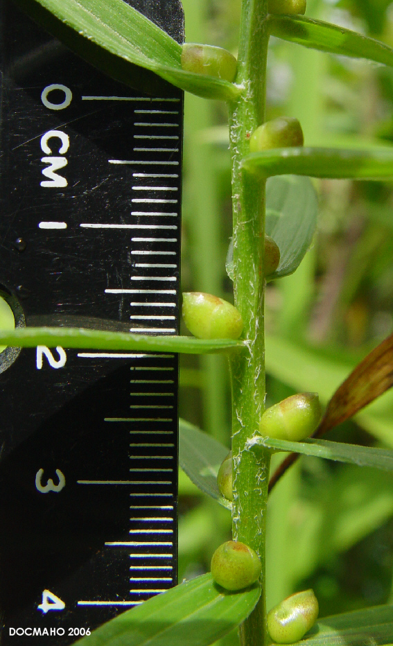 Lilium bulbiferum axil bulbils